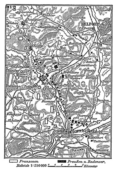 Kärtchen (1 : 250.000) zur Belagerung von Belfort 1870–71